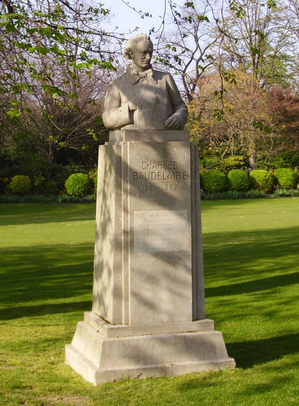 Pierre-Félix Masseau (Français, 1869-1937), dit Fix-Masseau: Charles Baudelaire, buste de pierre realisé en 1933, inauguré le 22 avril 1941, Paris, Jardin du Luxembourg.